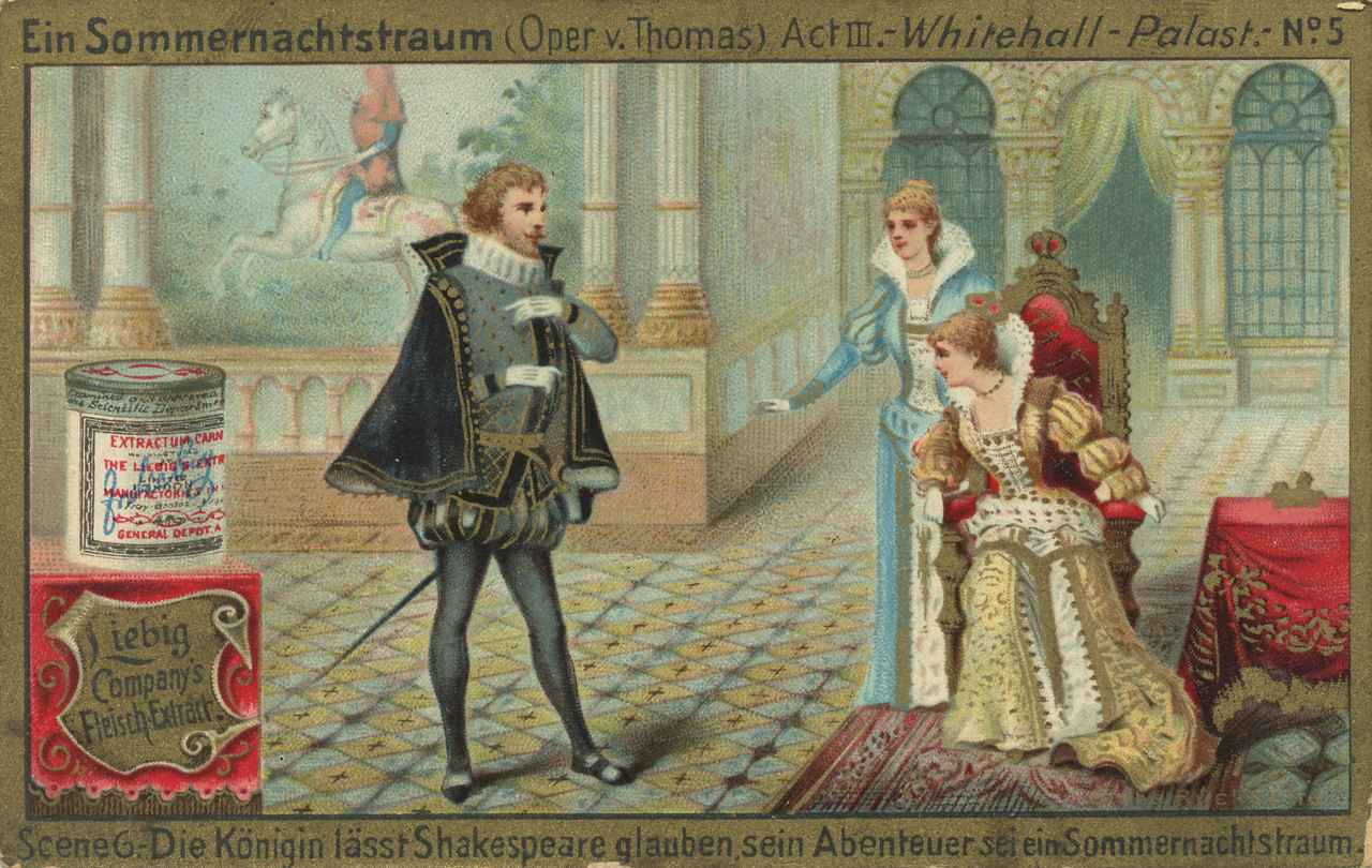 Act III. - Whitehall-Palast. No. 5 - Scene 6. – Die Königin lässt Shakespeare glauben, sein Abenteuer sei ein Sommernachtstraum